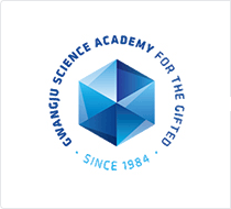 과학영재학교 광주과학고등학교의 로고이다.